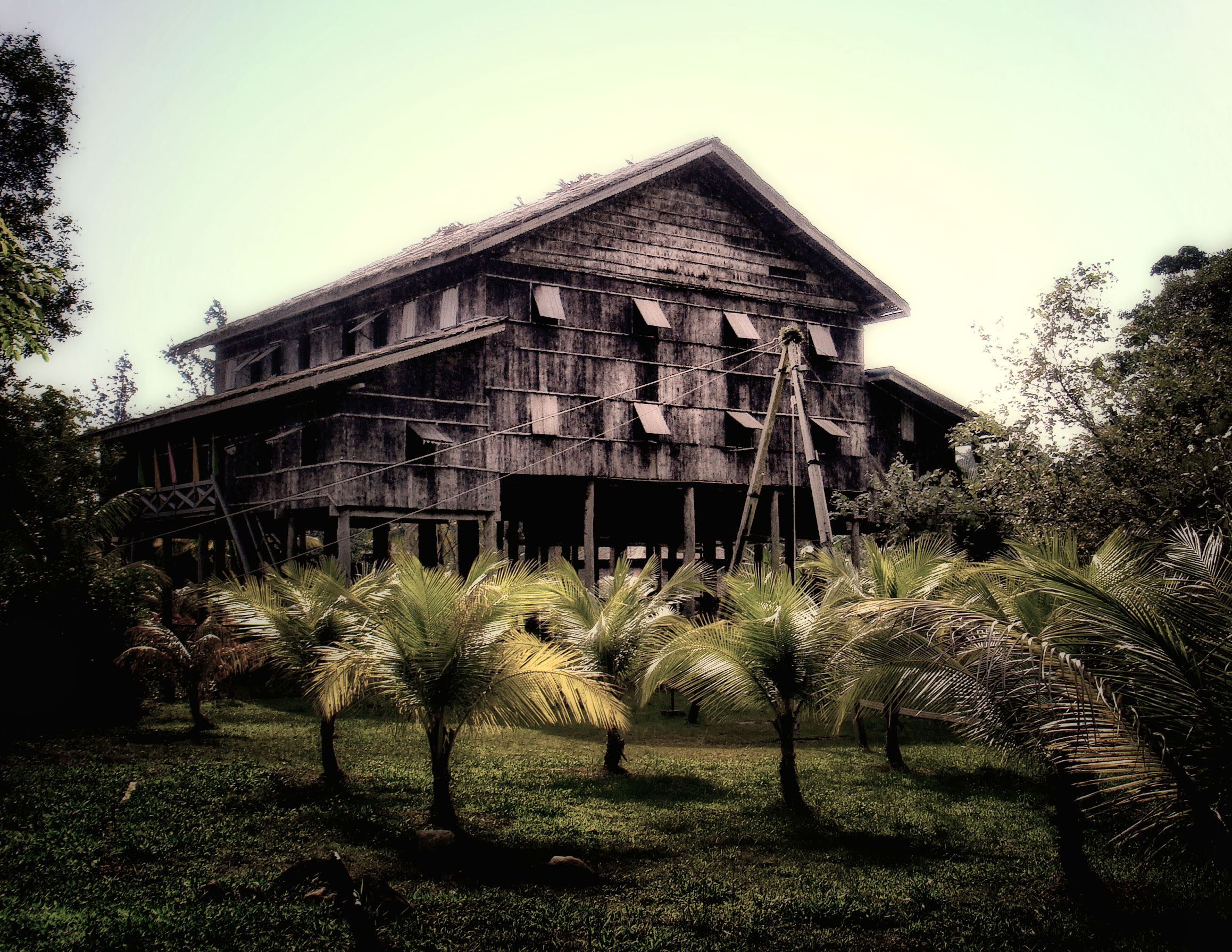 Melanum Tribe